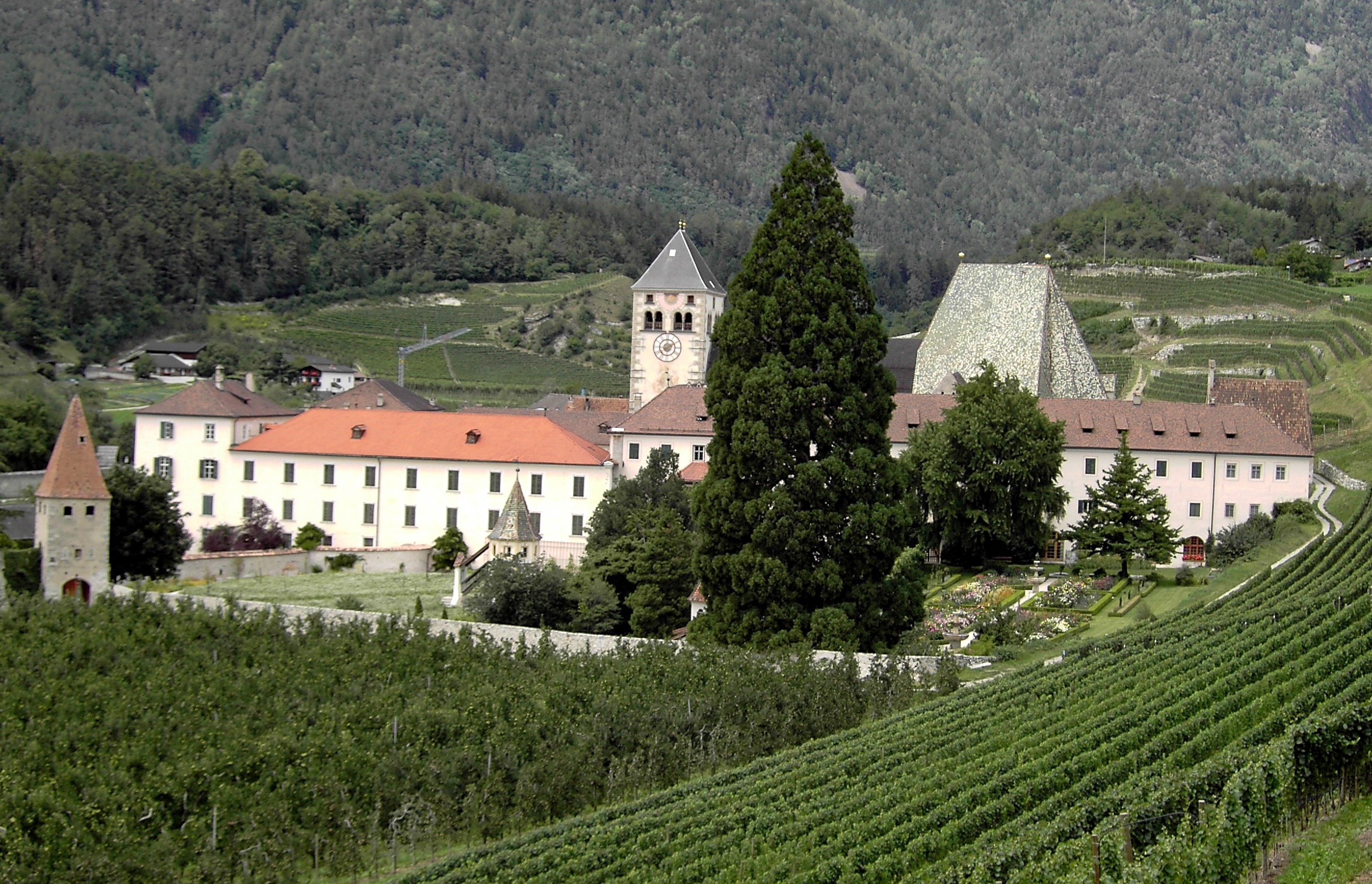 Kloster Neustift bei Brixen